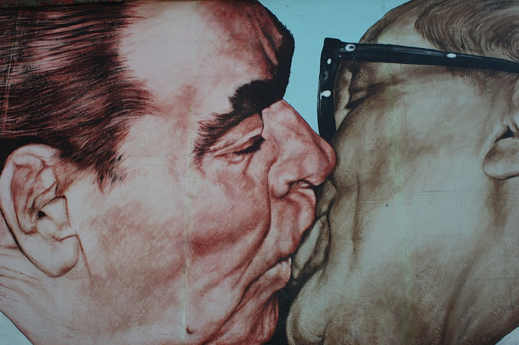 Berlingo mural ospetsuan agertzen diren irudi bat.